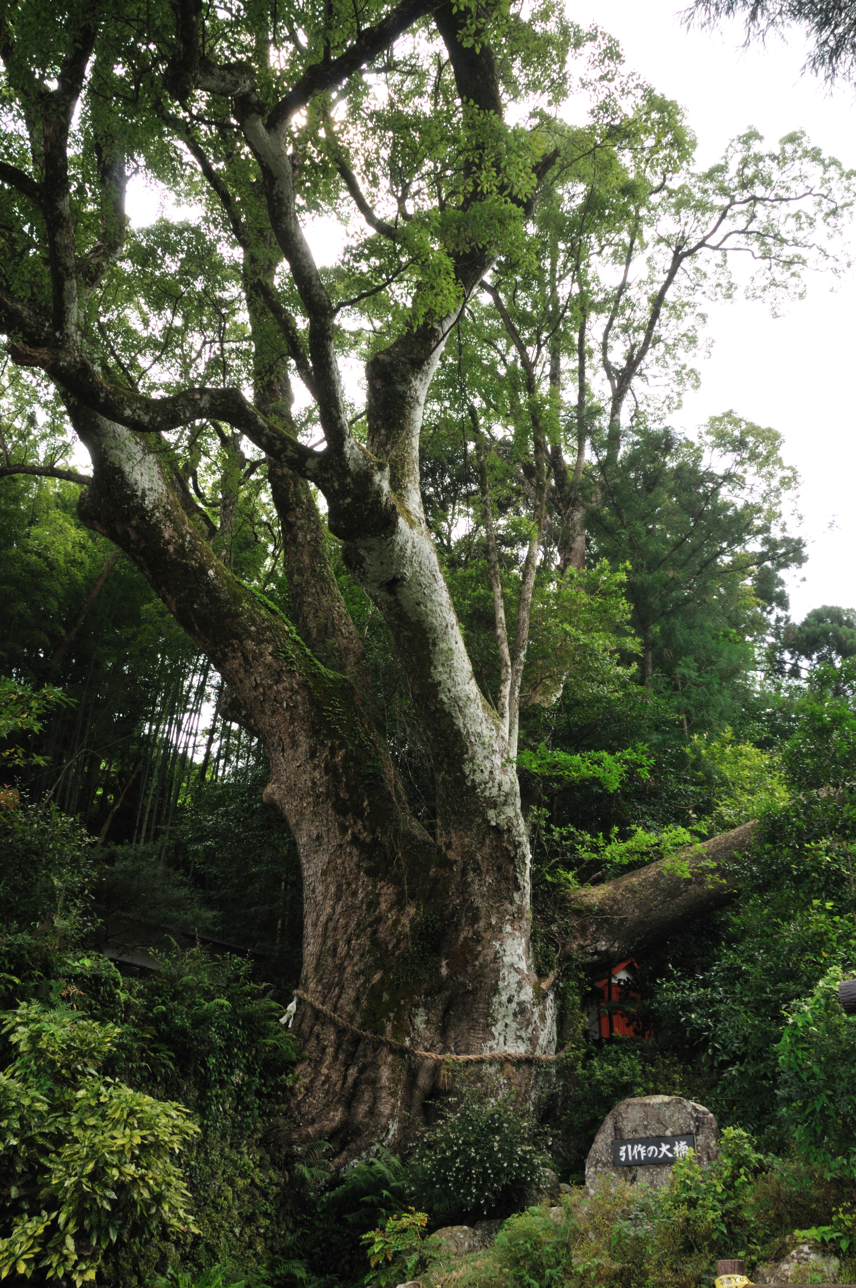 引作の大楠